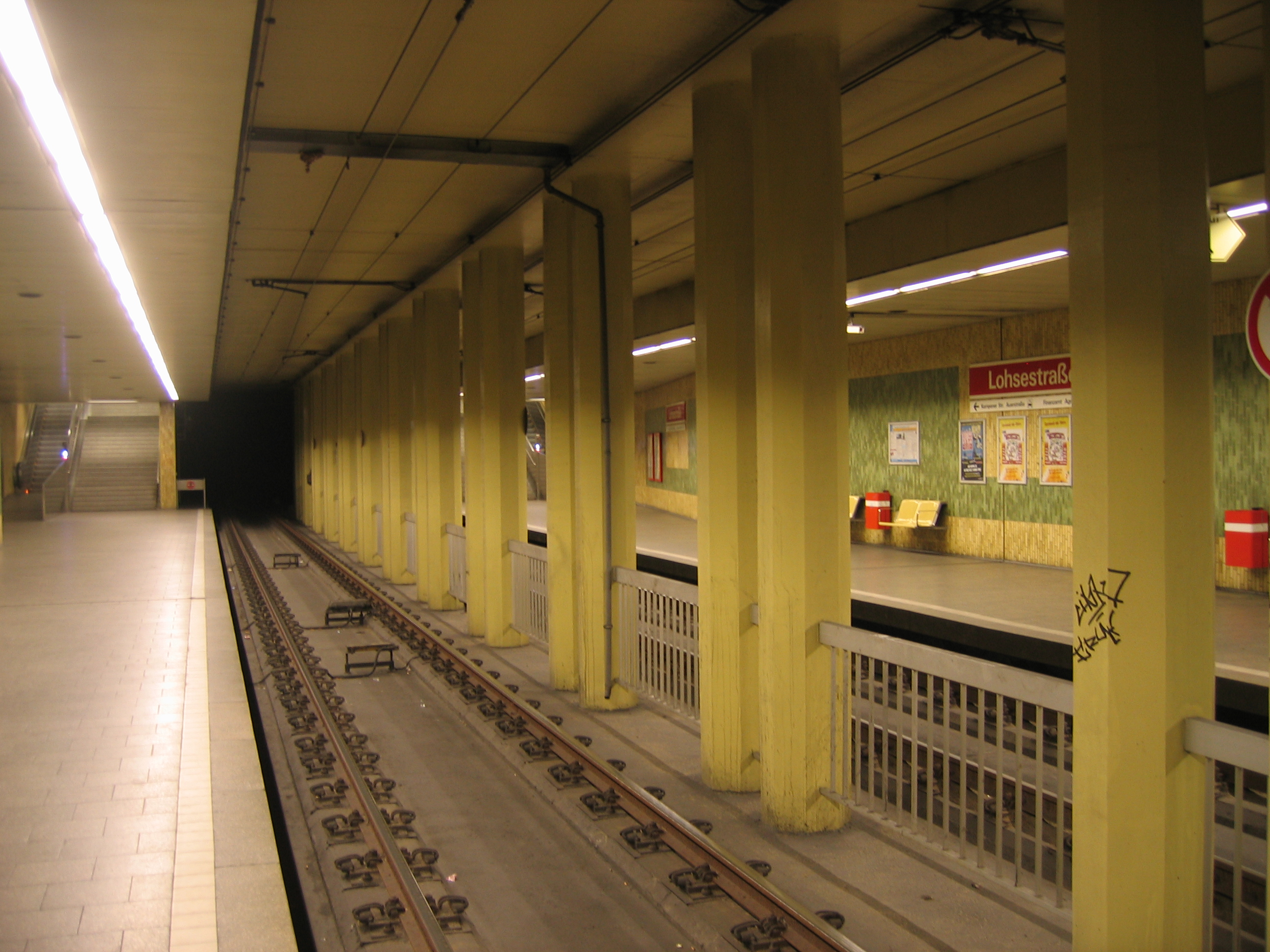 U-Bahn-Station Lohsestraße der Stadtbahn Köln